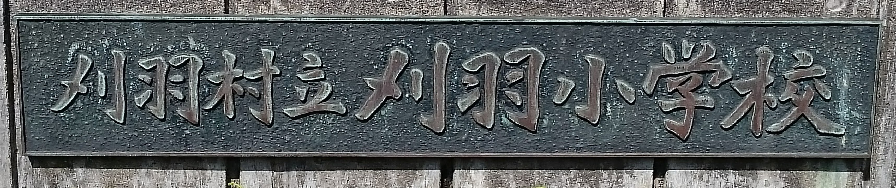 刈羽村立刈羽小学校の学校表示